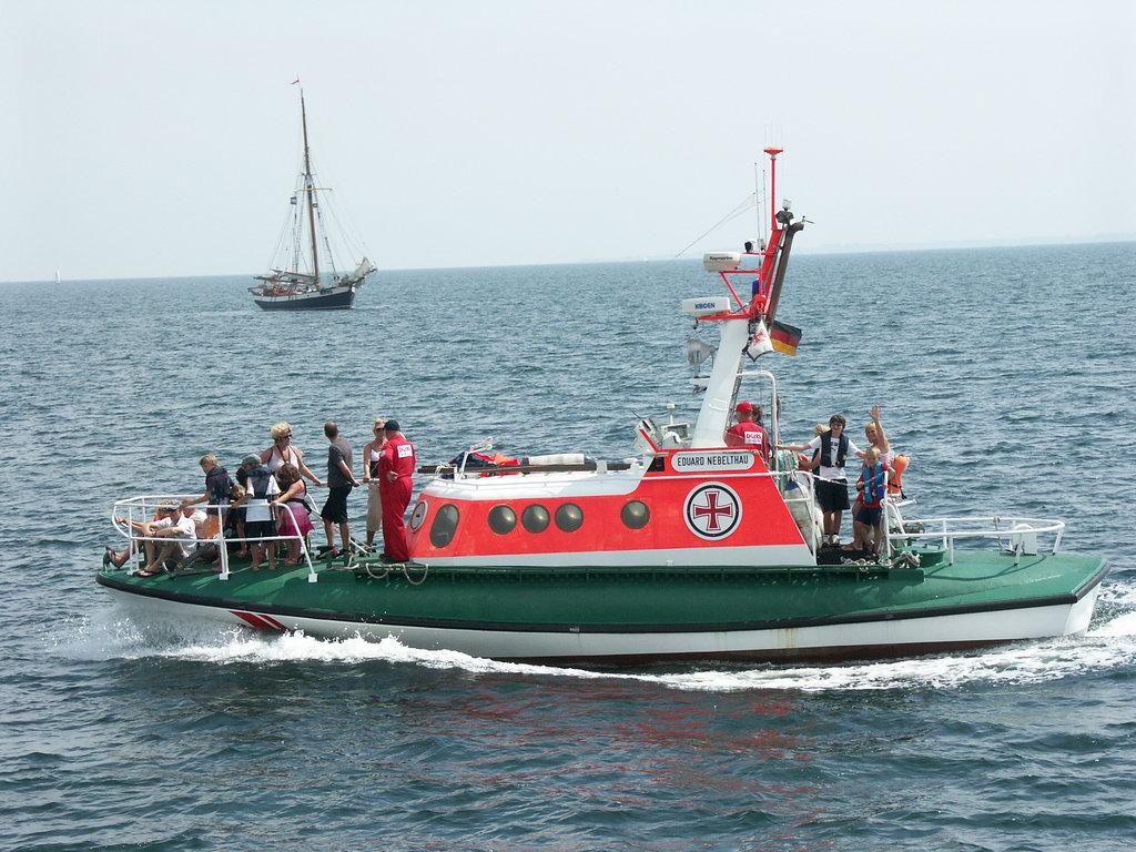 SRB Eduard Nebelthau beim "Tag der Seenotretter" in Grömitz